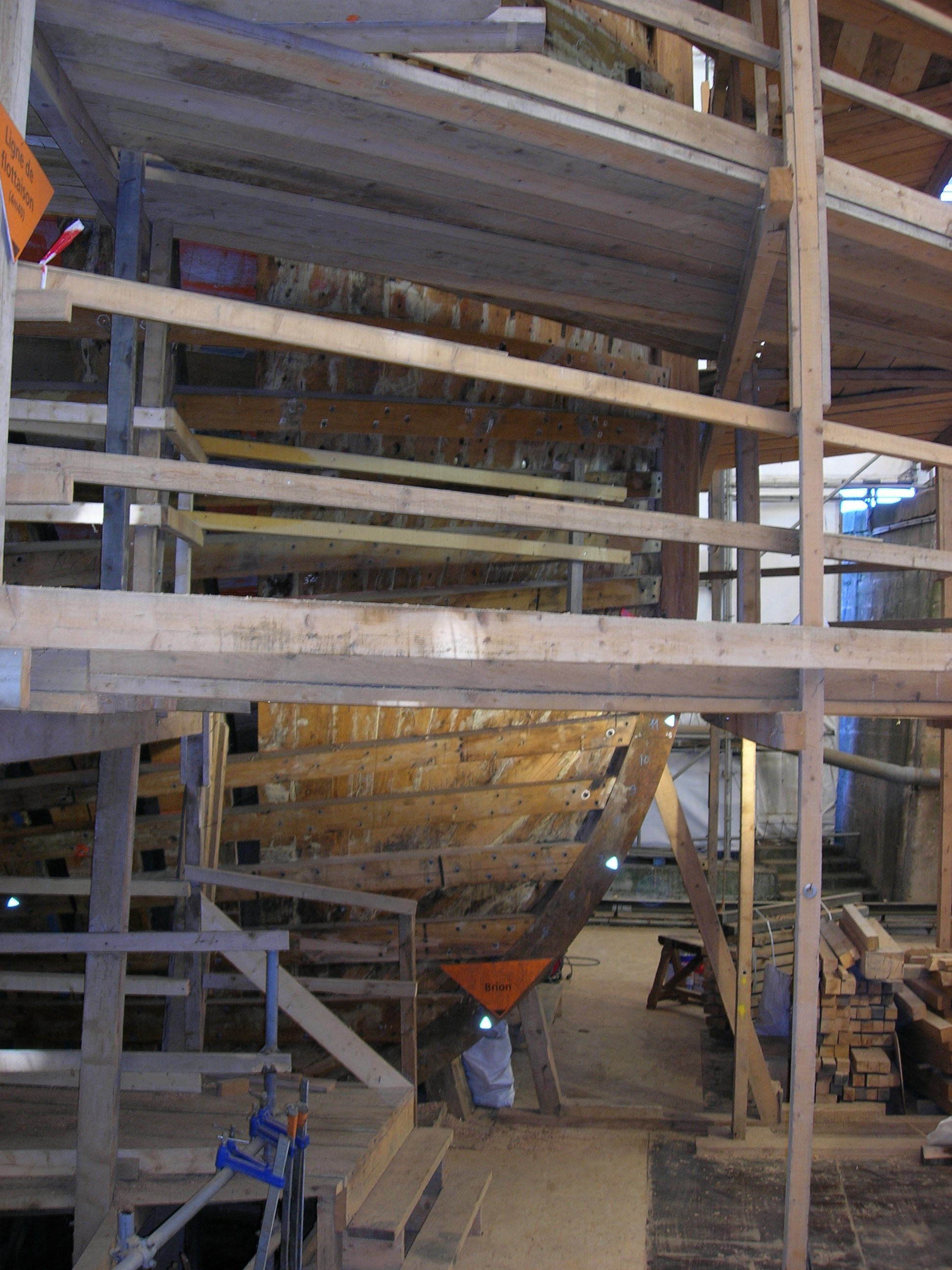 Reconstruction de l'Hermione a rochefort (France)